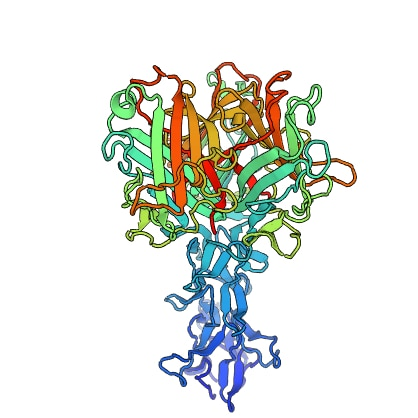 La trimerización de la proteína adenoviral aporta estabilidad a la cápside vírica. Se puede apreciar también la estructura globular denominada knob.